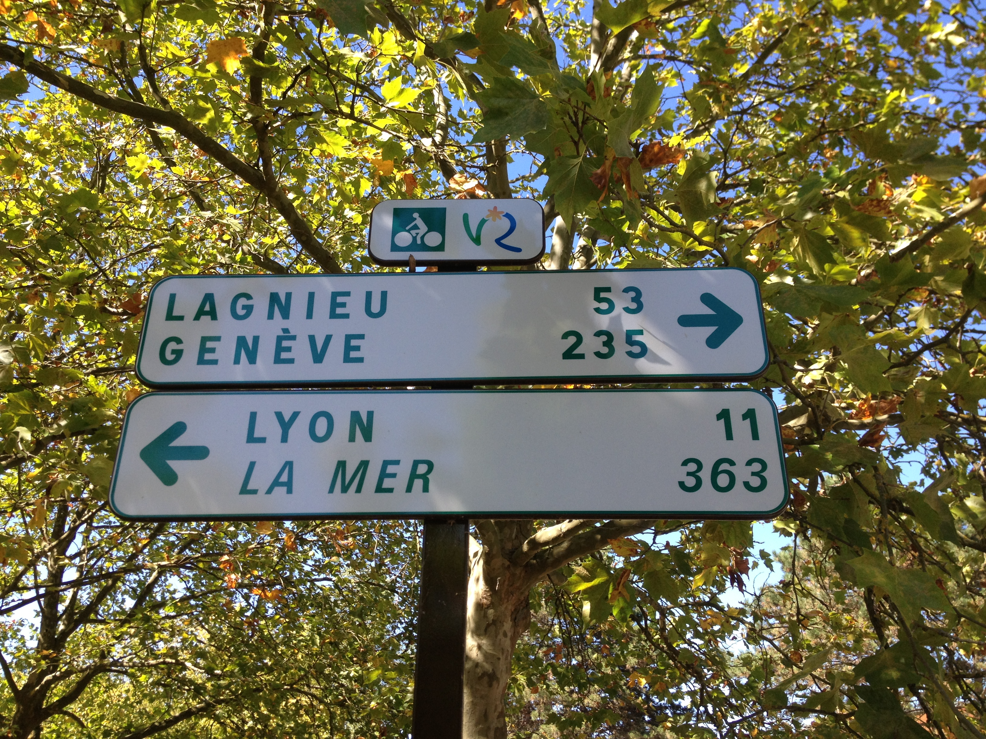 Panneau Lyon-Genève-Lagnieu-La mer au Parc de Miribel-Jonage.